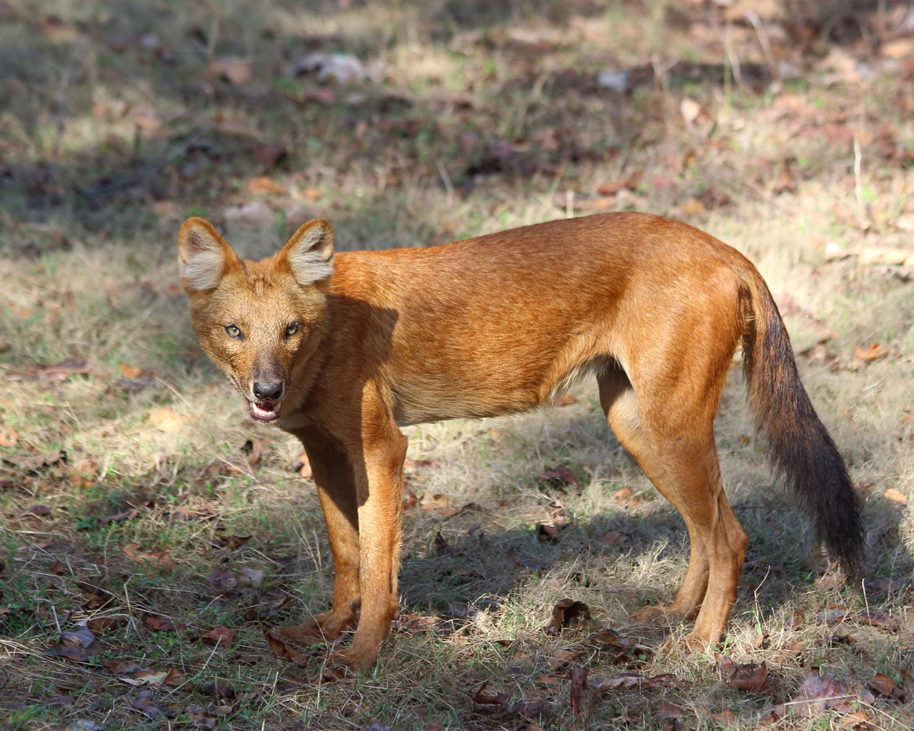 Dhole, Pench (Inde)